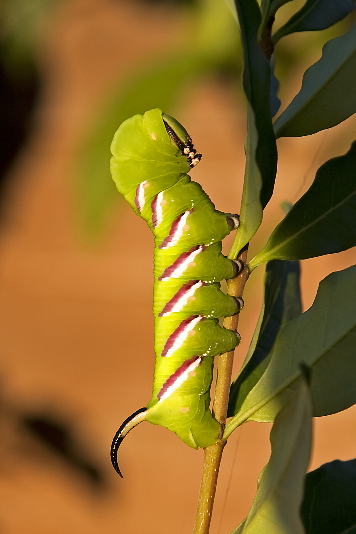 einige Tage vor der Verpuppung - aufgenommen in 33428 Harsewinkel (Germany)